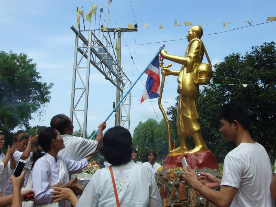 พระพุทธรูปด้านหน้าวัด ปาง เดินธุดงค์